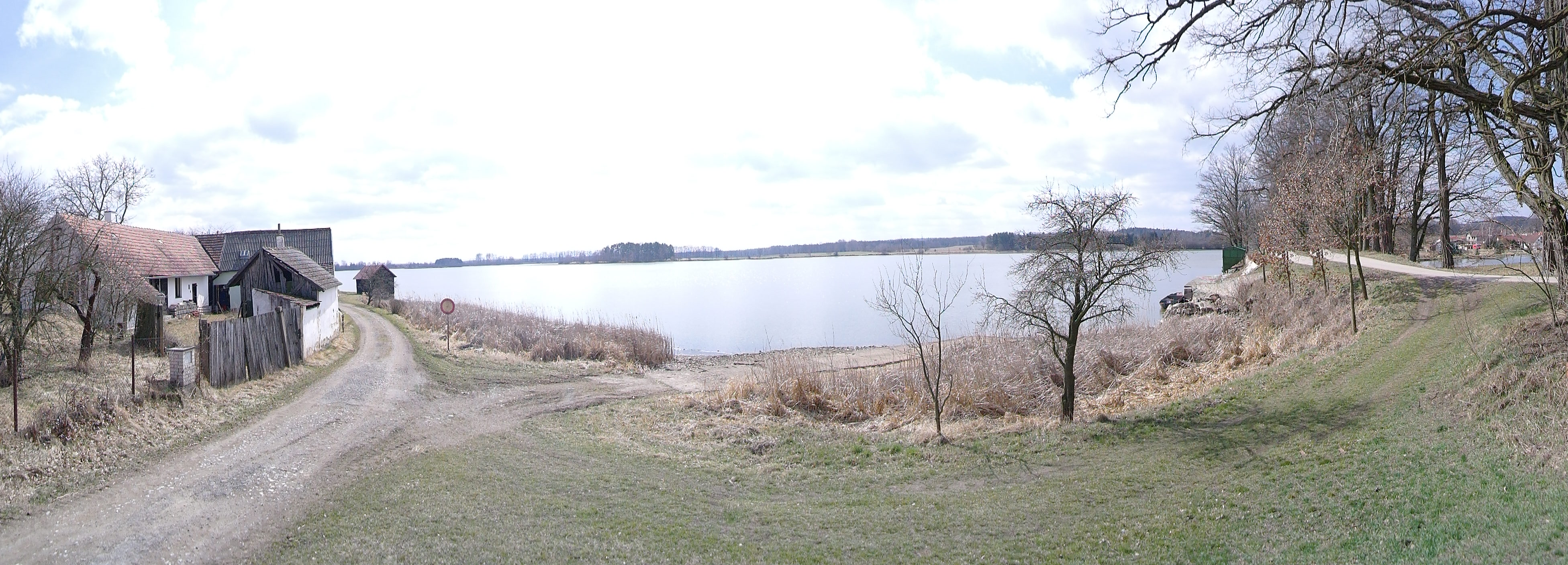 Vlkovice, Vlkovický rybník